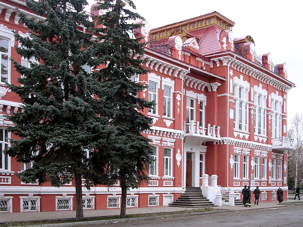 Земская Управа Стерлитамак